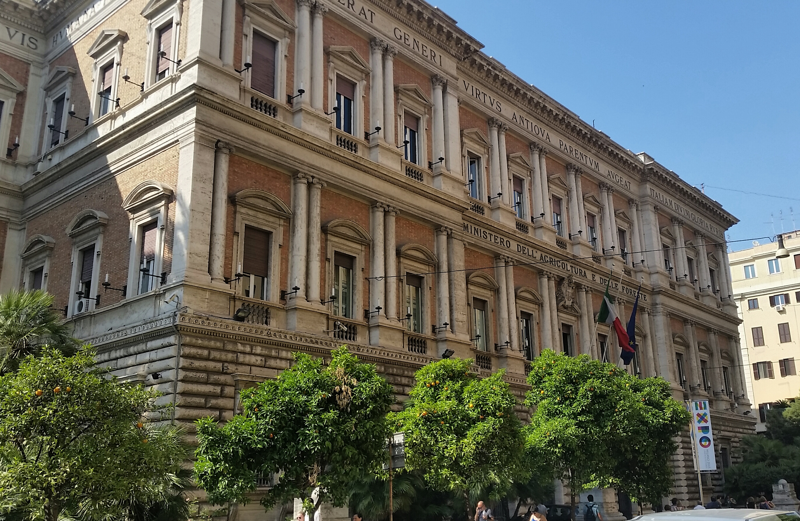 Sede del MIPAAF - Ministero delle Politiche Agricole Alimentari e Forestali. Roma Via XX settembre, 20